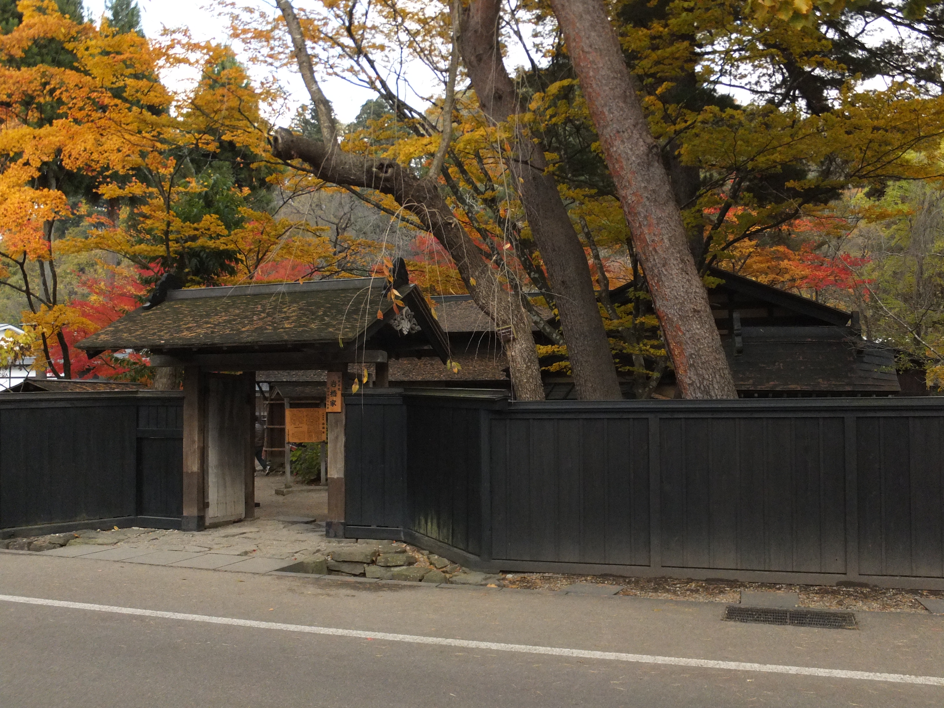 岩橋家住宅（秋田県仙北市角館、武家屋敷通りより撮影）